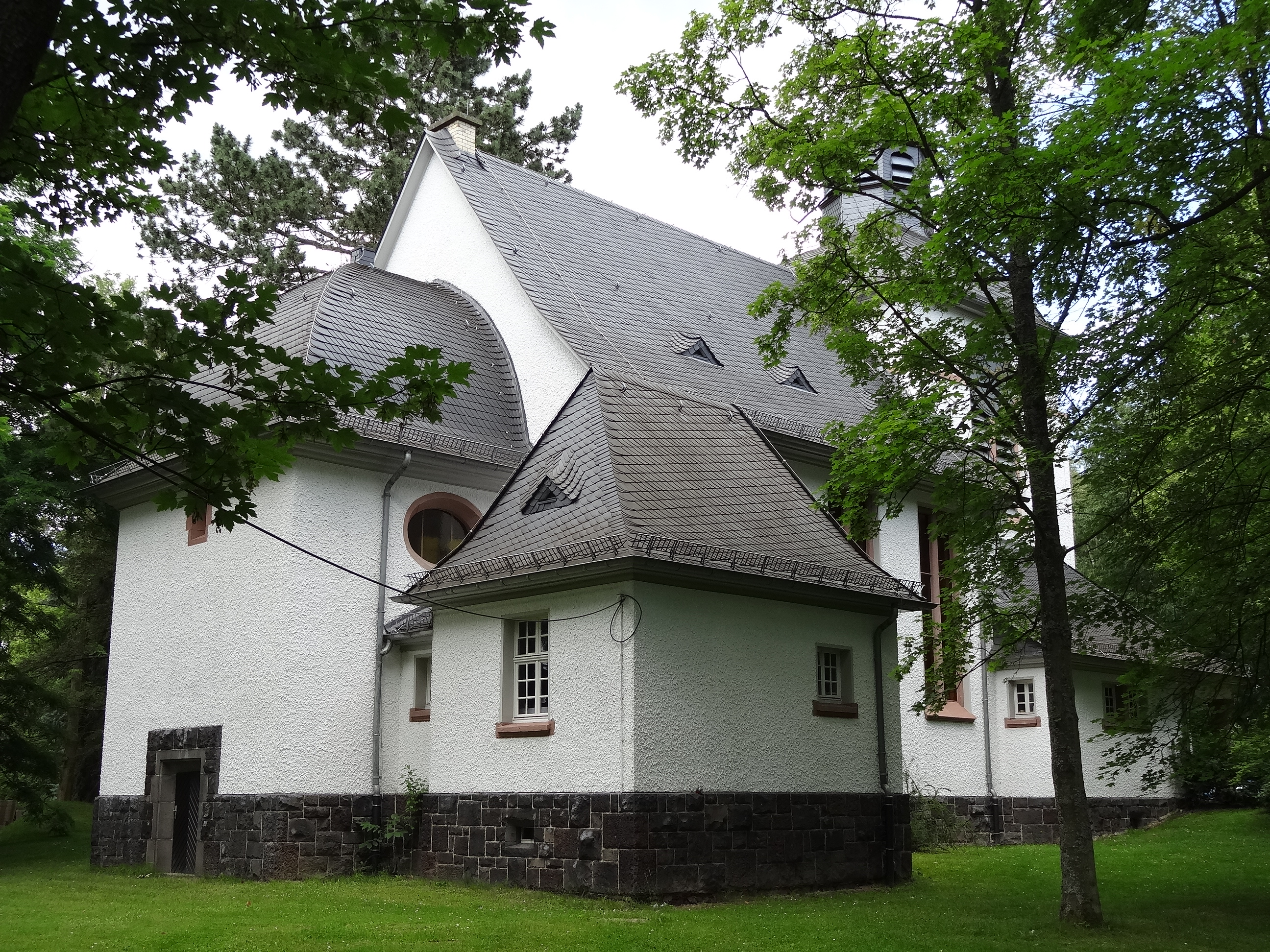 Kapelle in den VITOS-Kliniken für Psychiatrie